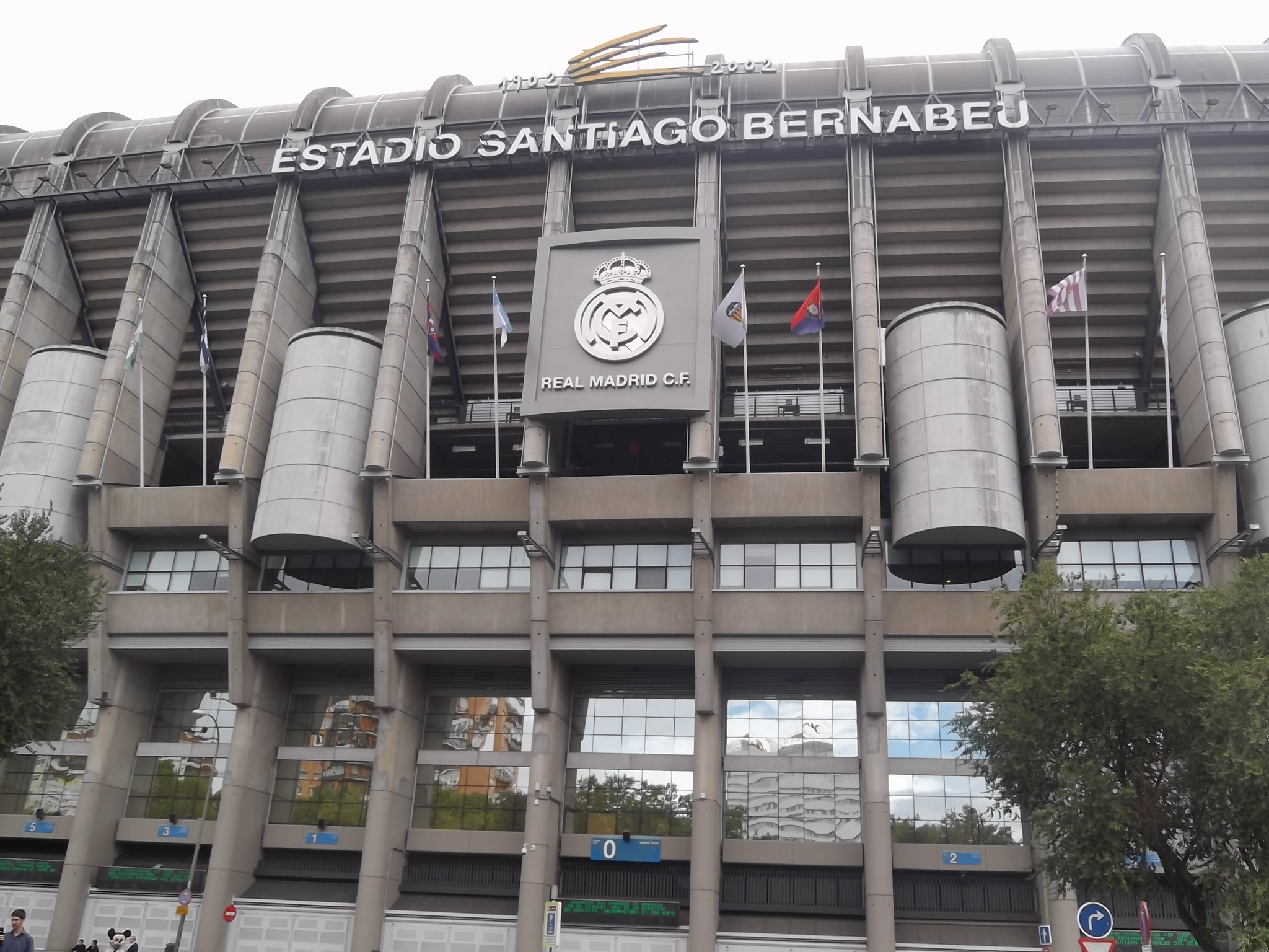 ملعب سانتياغو برنابيو من الخارج.